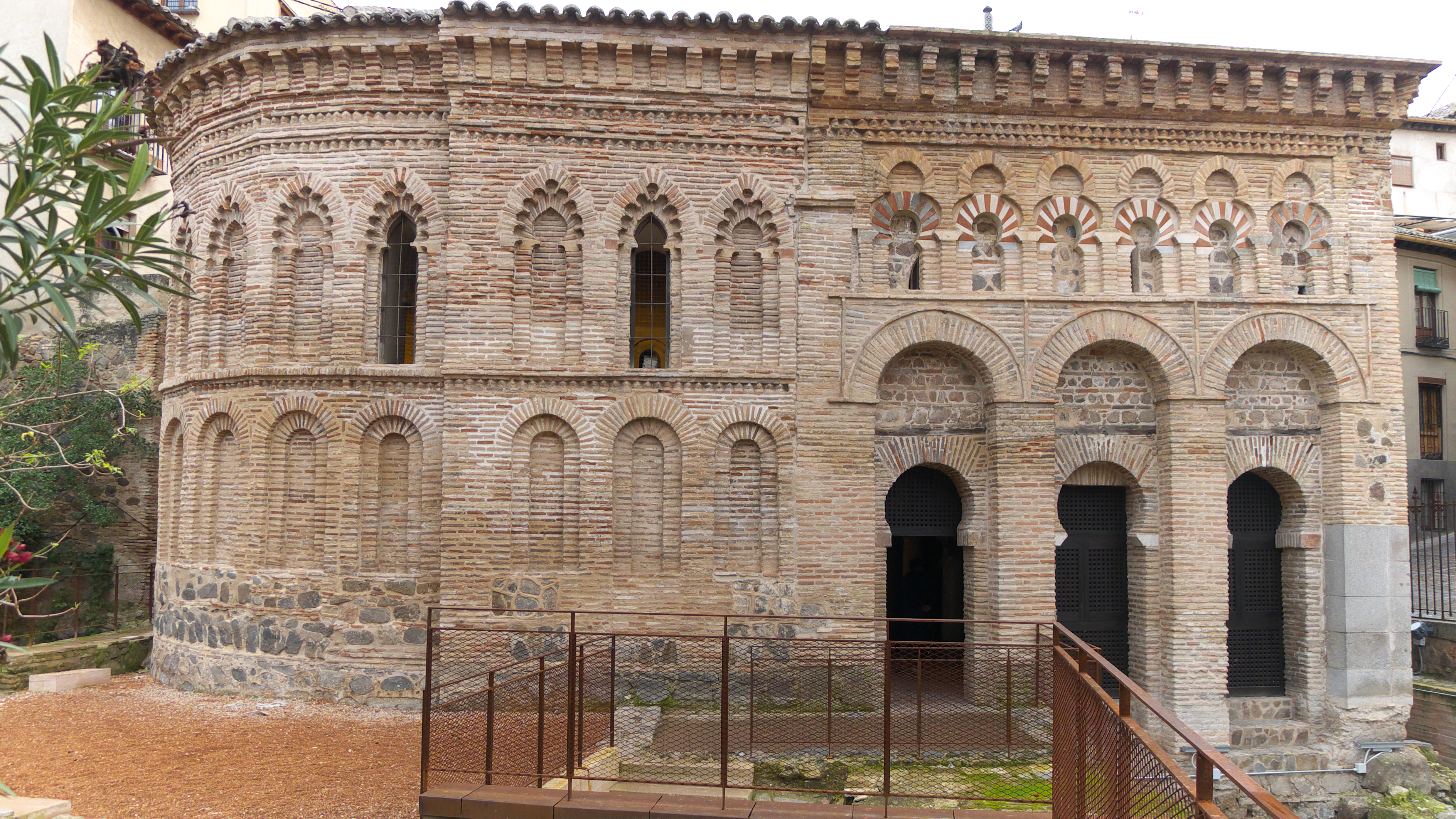 Fachada noroeste. Mezquita califal (999/1000) para oratorio privado del ulema Aḥmad ibn Ḥadīdī. Construída por Mûsâ ibn ‘Alî y Sa‘ada, sigue fielmente las formas de la mezquita-aljama de Córdoba. File:Façade of the Mosque of the Three Gates.jpg File:Mosquée Bou Ftetah, medina de Sousse, 30 septembre 2013 (04).jpg